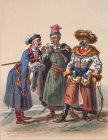 Jan Nepomucen Lewicki. Ubiory szlachty z: Album polonais, po 1830, litografia z kolekcji Muzeum Pałacu w Wilanowie.